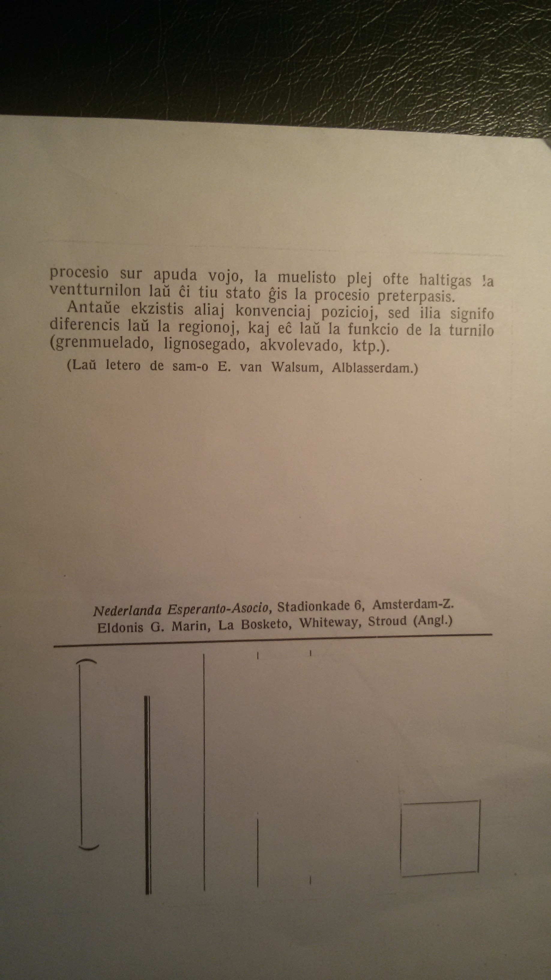 Vidindajxoj